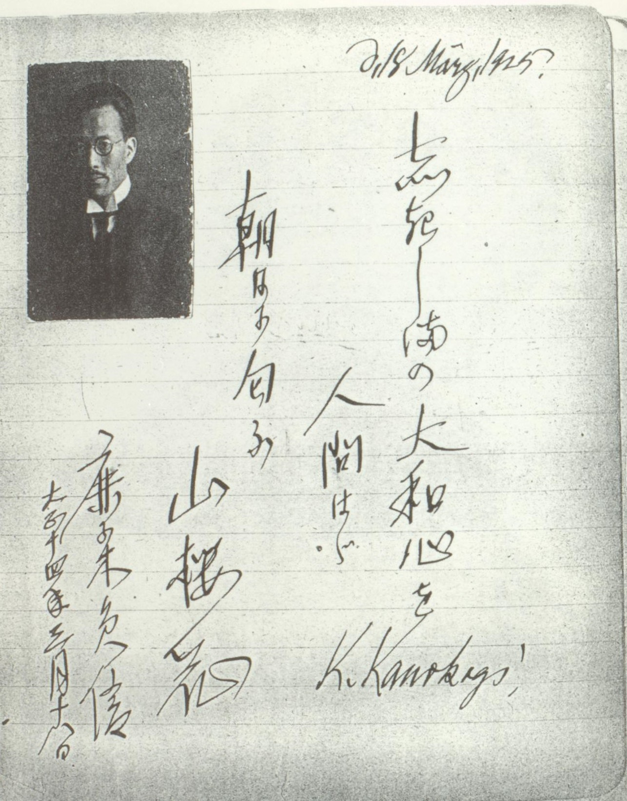 Kazunobu Kanokogi Gästebucheintrag bei Mosheh Ya’akov Ben-Gavriêl 18. März 1925